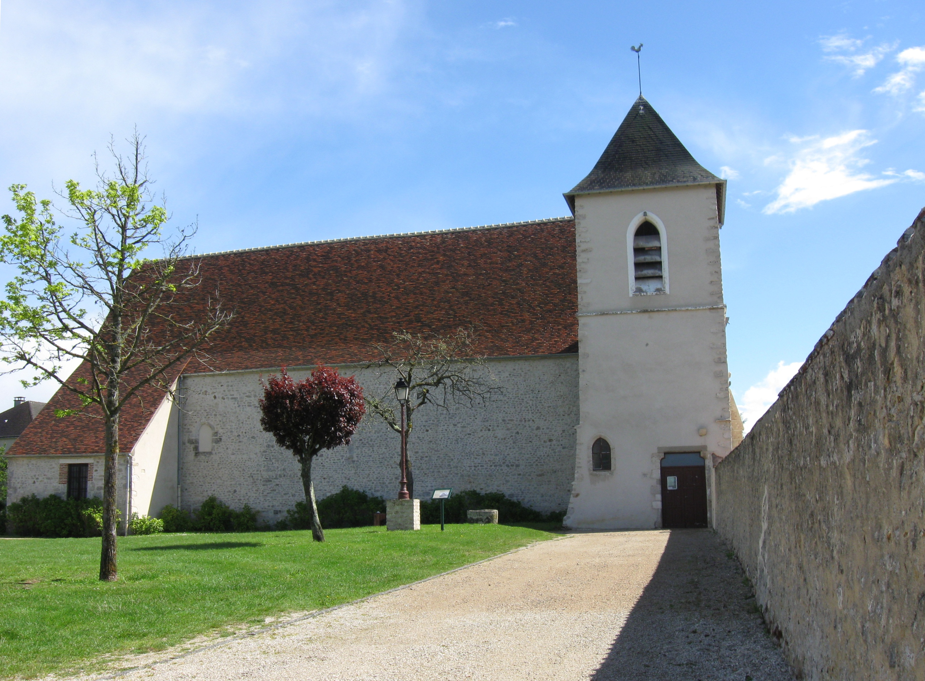 Église Saint-Étienne de Dordives. (Loiret, région Centre-Val de Loire).